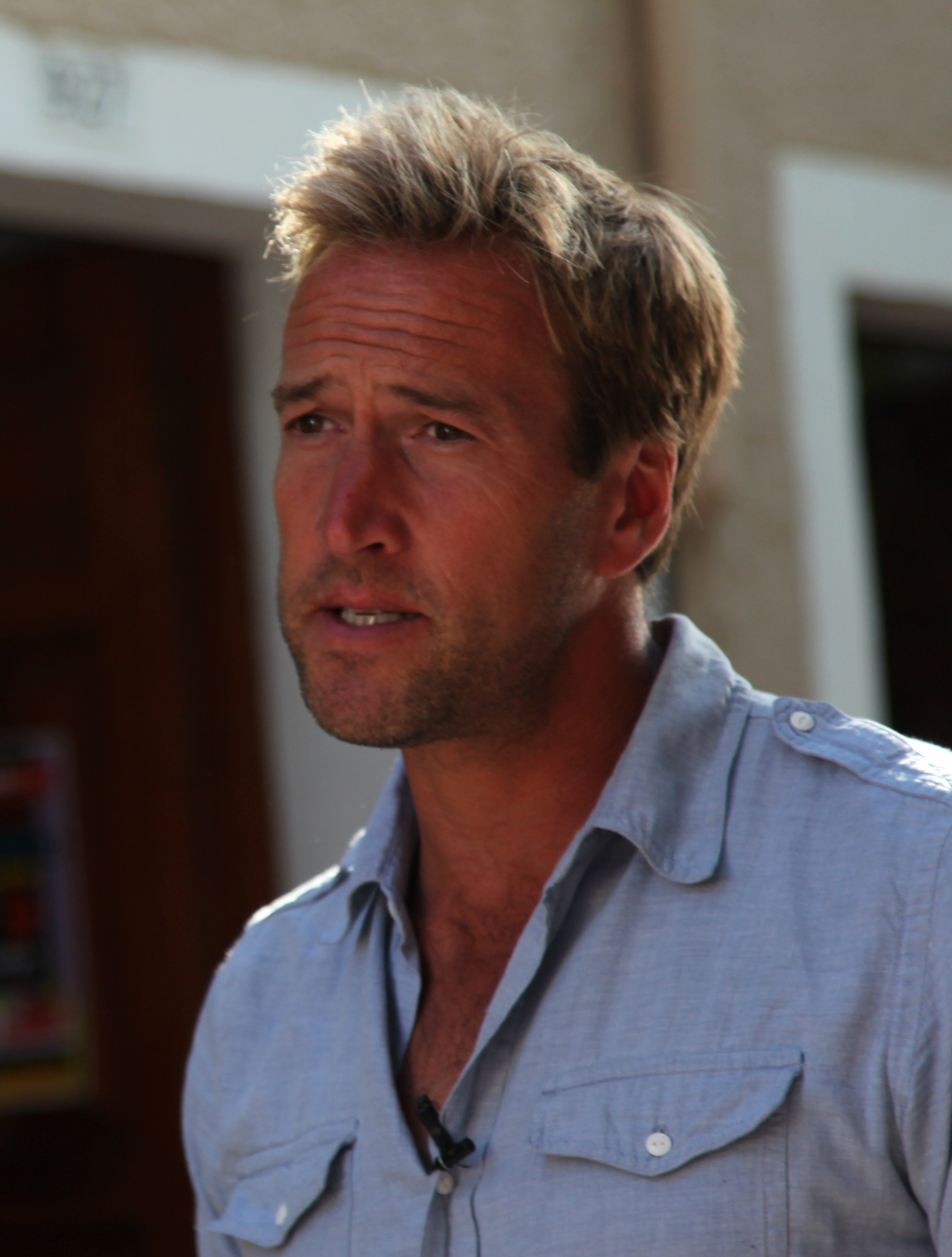 Periodista inglés Ben Fogle visita barrio La Ronda - Quito Ecuador (more info)